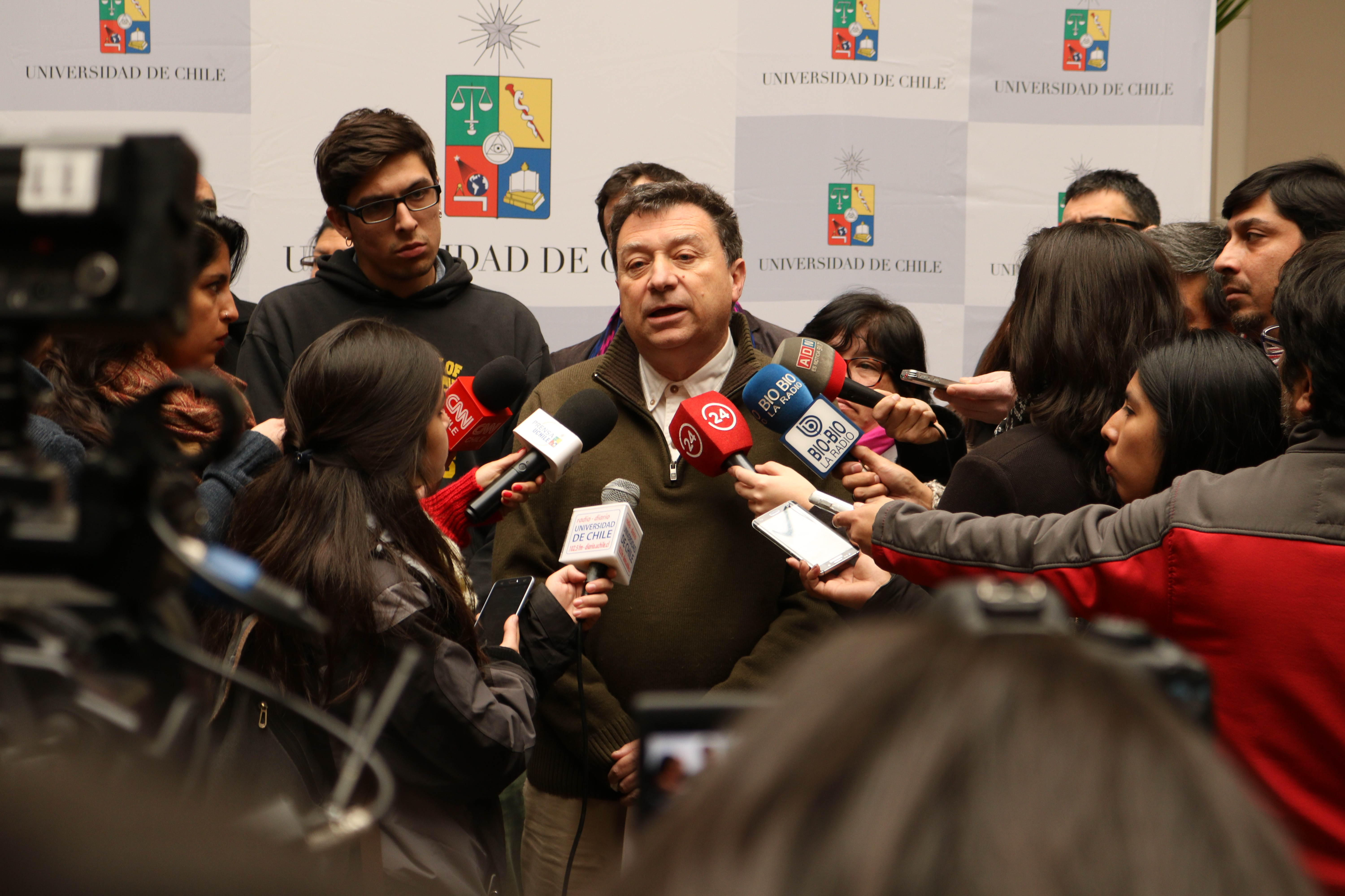 Sesión extraordinaria del Senado Universitario para analizar una postura institucional ante la inminente aprobación en la Cámara de Diputados del proyecto de ley de educación superior, que comprometería la autonomía universitaria, su financiamiento y organización.